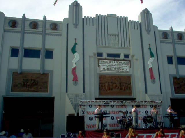 Fachada del Estadio de la Revolución, Torreón, Coah.